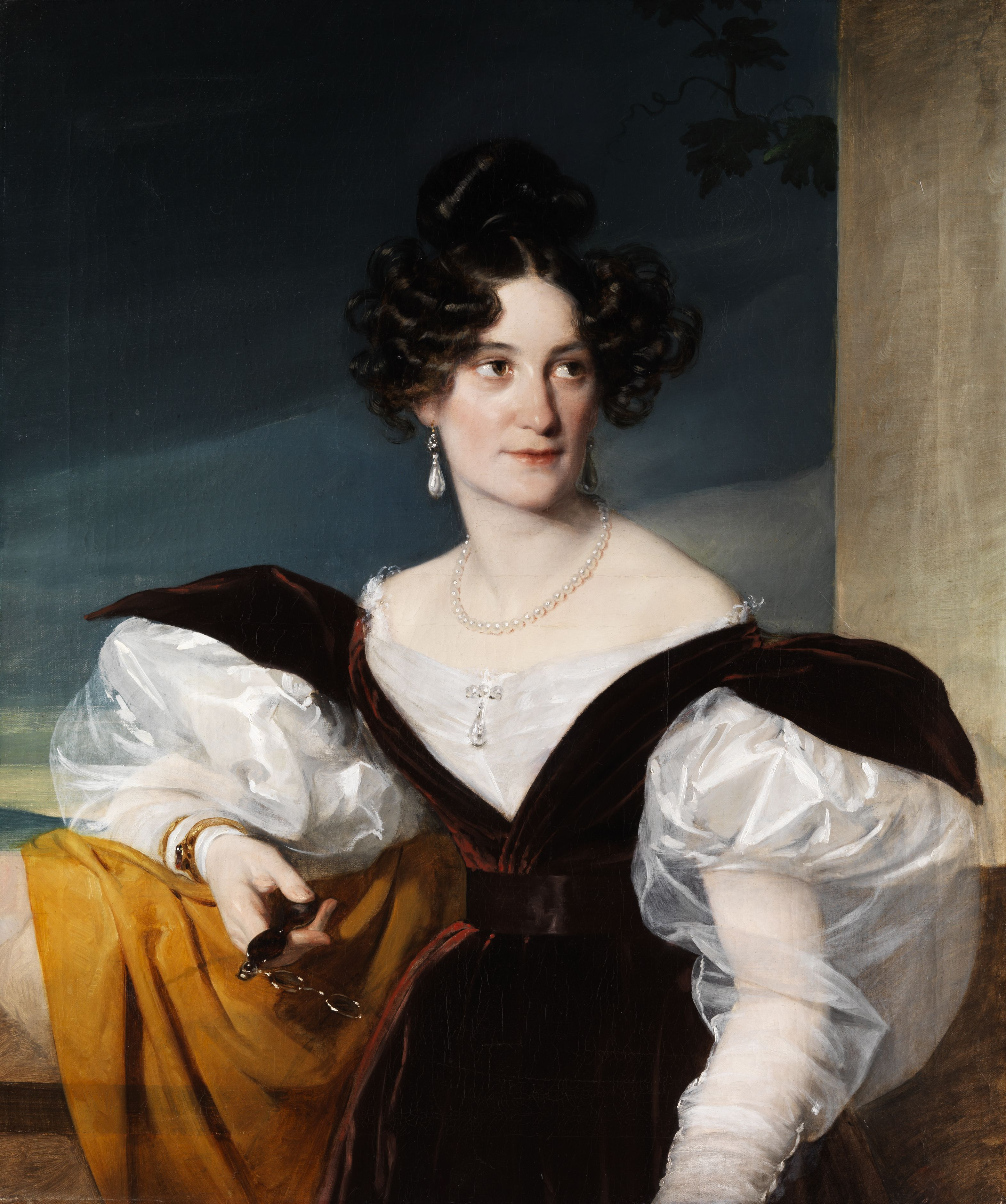 (Epoche Louis-Philippe)